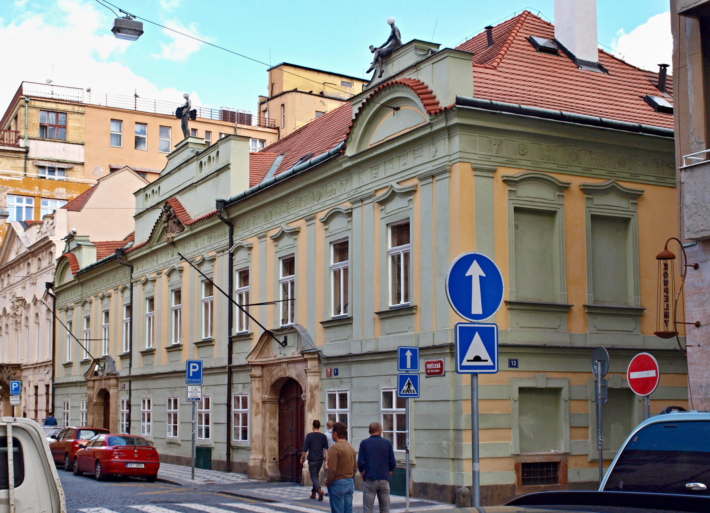 Deymův palác